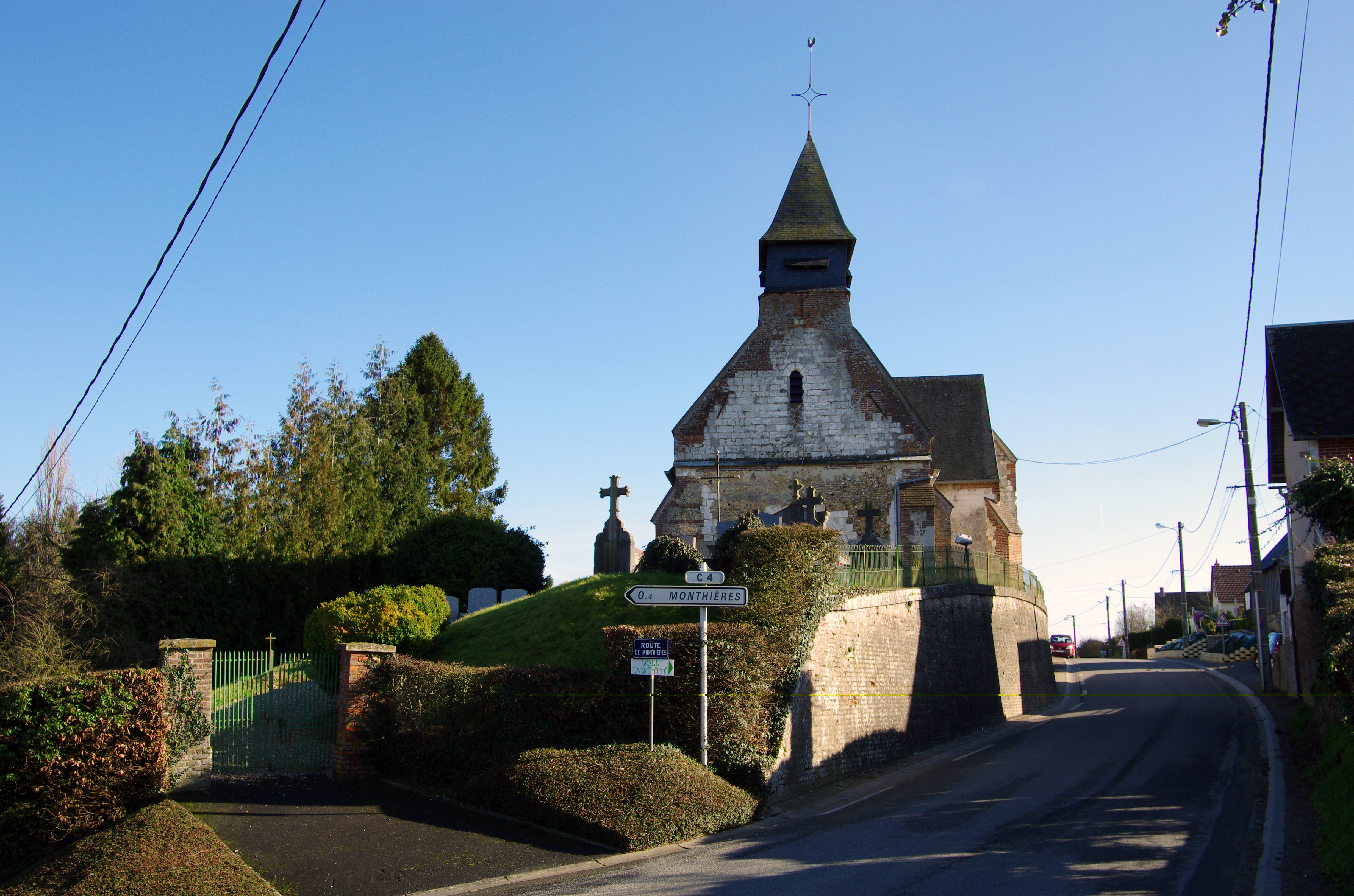 Monchaux-Soreng (Seine-Maritime, France) - L'église Saint-Martin de Soreng.